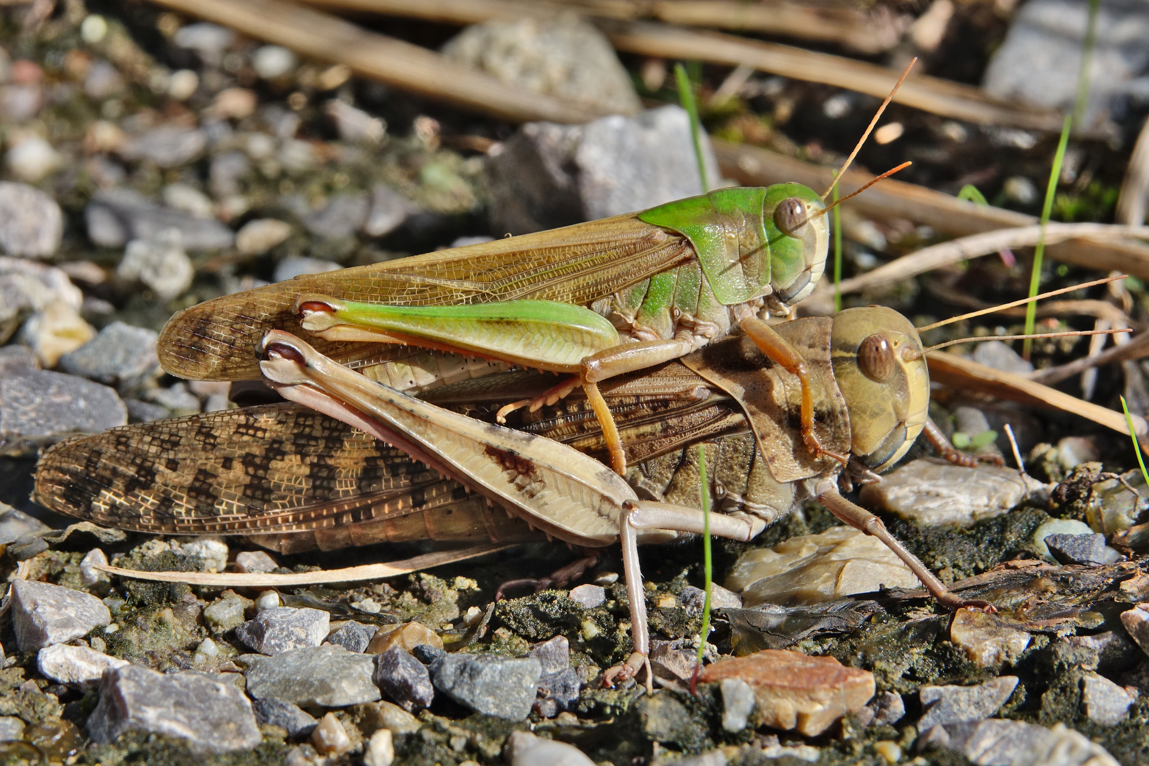 トノサマバッタの交尾 日本、東海地方